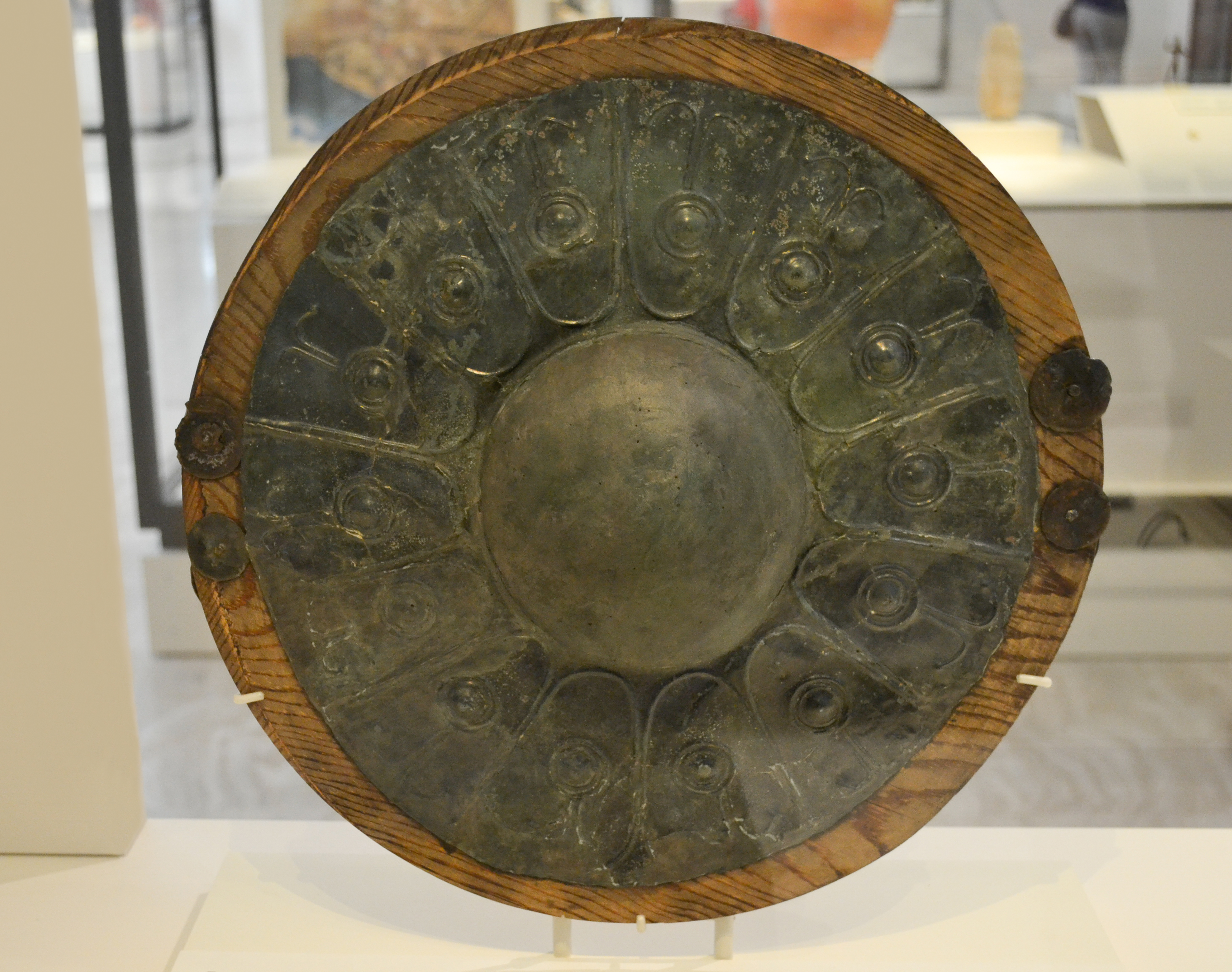 Escudo celtibérico de bronce tipo caetra, formado por umbo central y a su alrededor catorce semiovalos con círculos concéntricos y otros motivos realizados mediante repujado. Necrópolis de El Cuarto - La Muela de San Juan (Griegos, Teruel). Siglo V - principios del IV a. C. Diámetro: 33,50 cm; diámetro máximo: 37 cm; grosor: 0,20 cm. Tipología: Quesada IA. Nº inv. 1976/40/1. Museo Arqueológico Nacional de España.